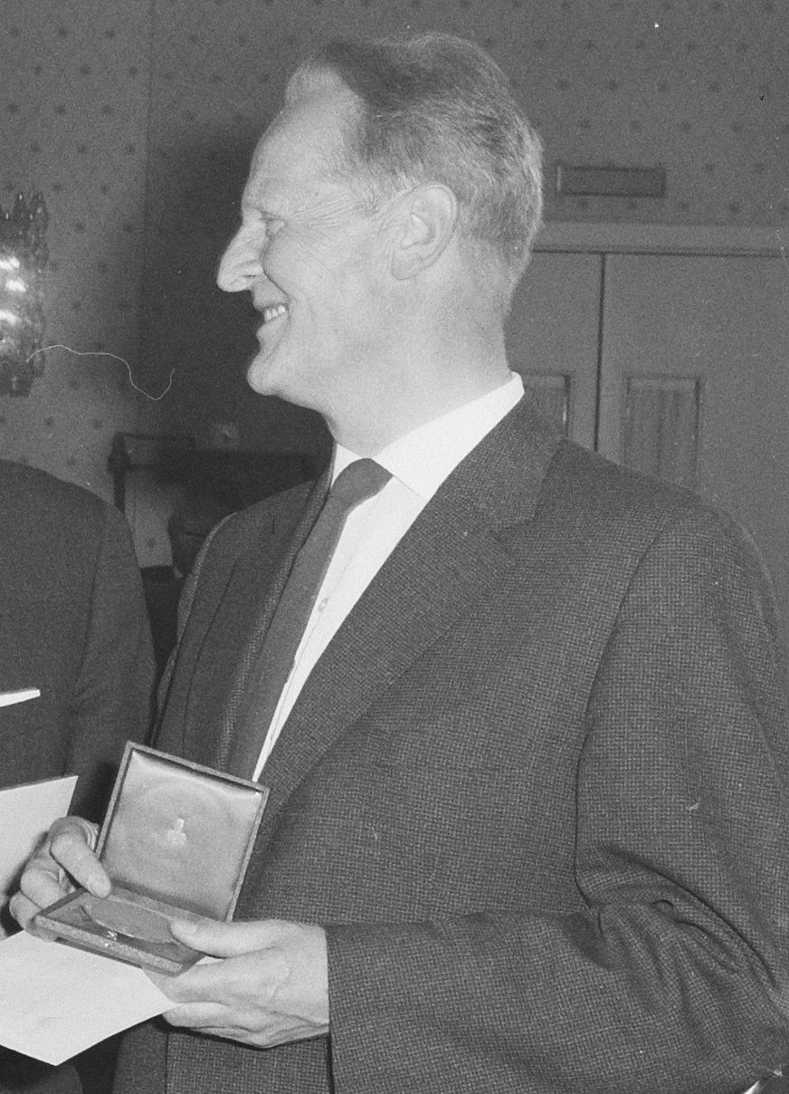 Collectie / Archief : Fotocollectie Anefo Reportage / Serie : [ onbekend ] Beschrijving : ANWB-prijs 1962 voor Wim Alings jr., George Sluizer, Philip Bloemendal en Jac. Gazenbeek Datum : 14 juni 1962 Fotograaf : Nijs, Jac. de / Anefo Auteursrechthebbende : Nationaal Archief Materiaalsoort : Negatief (zwart/wit) Nummer archiefinventaris : bekijk toegang 2.24.01.03 Bestanddeelnummer : 914-0277